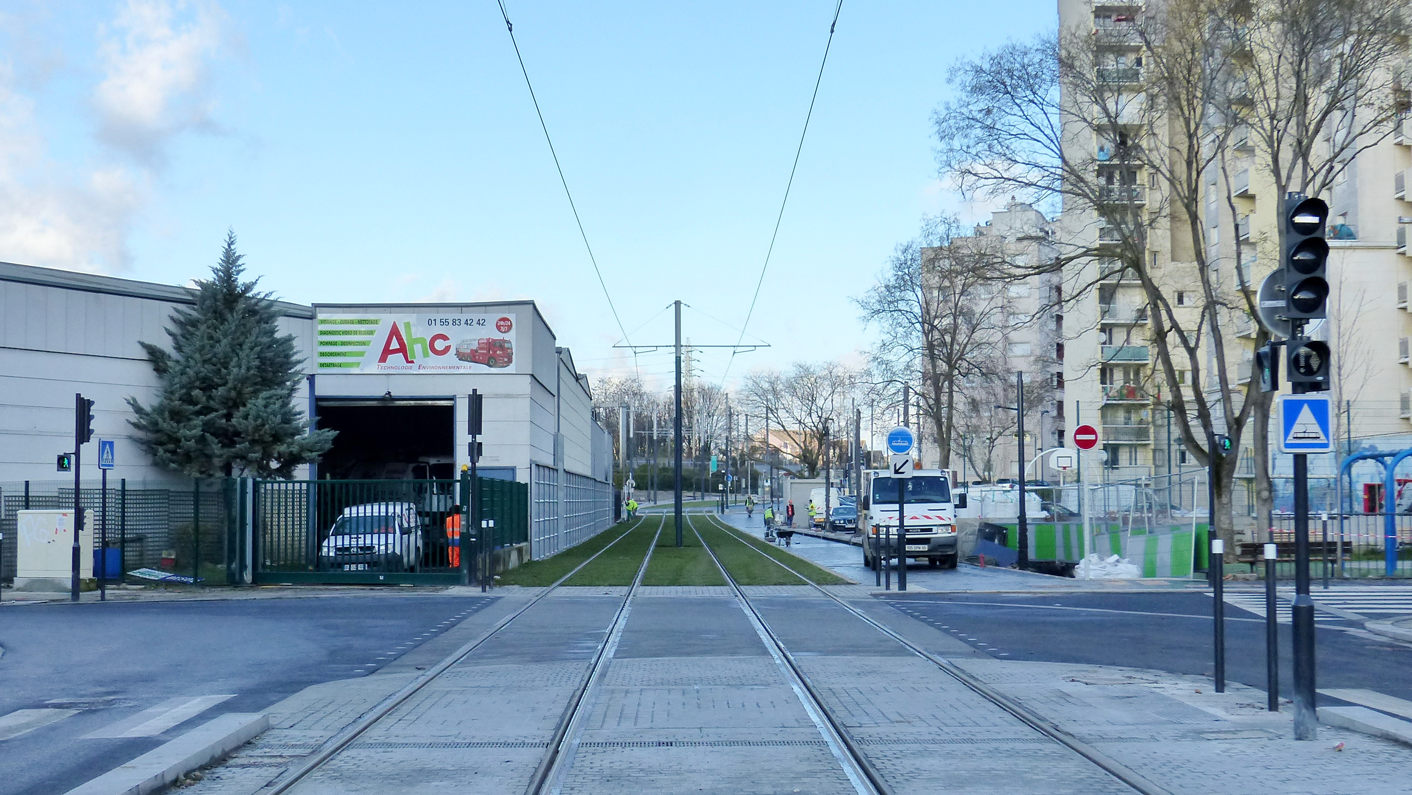 Tramway T8 dans la section en site propre total, le long de la cité Jacques Duclos à Saint-Denis. La voie créée le long de l'emprise n'est autorisée qu'aux circulations douces